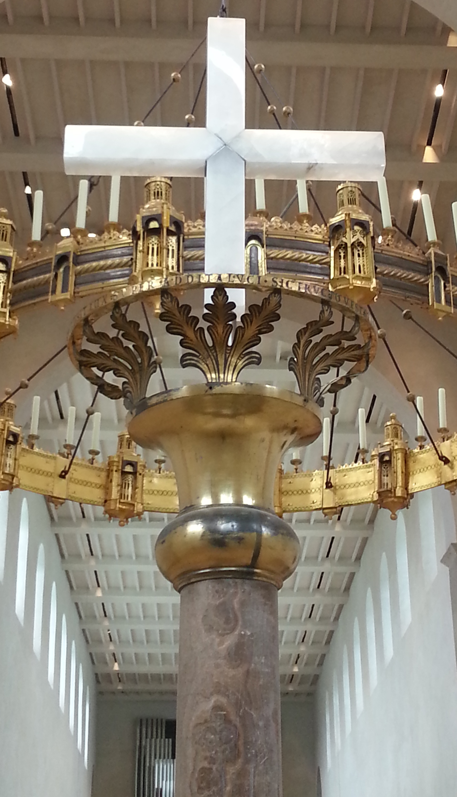 Oberer Teil der Mariensäule (auch: Irmensäule) im Hildesheimer Dom. Im Hintergrund der Thietmarleuchter. Im Zuge der Domsanierung von 2010–14 wurde der Abschluss der Säule im Vergleich zu früher erneut verändert, die ehemalige Marienfigur durch ein Kristallkreuz ersetzt.